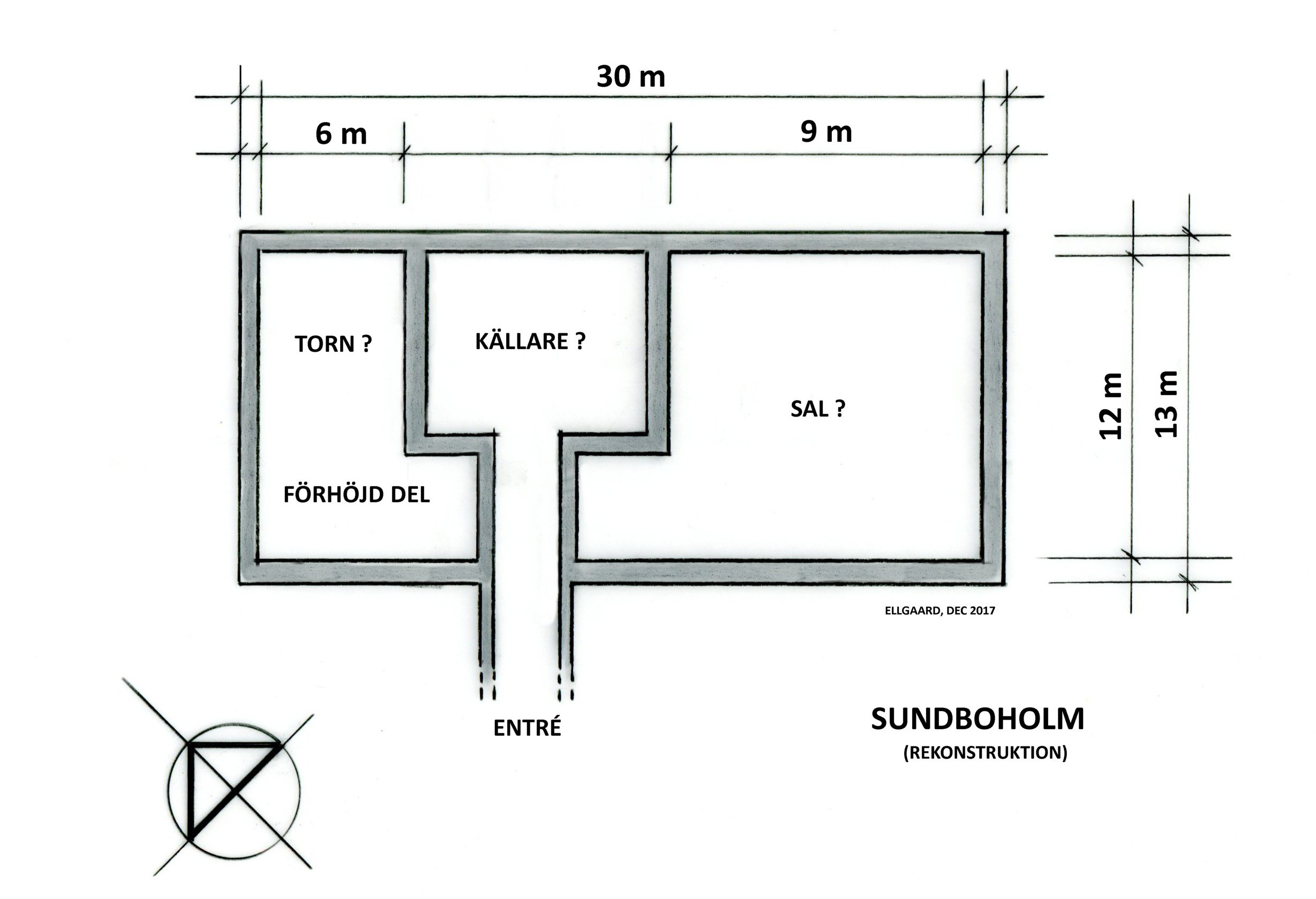 Sundboholm rekonstruktion, källa